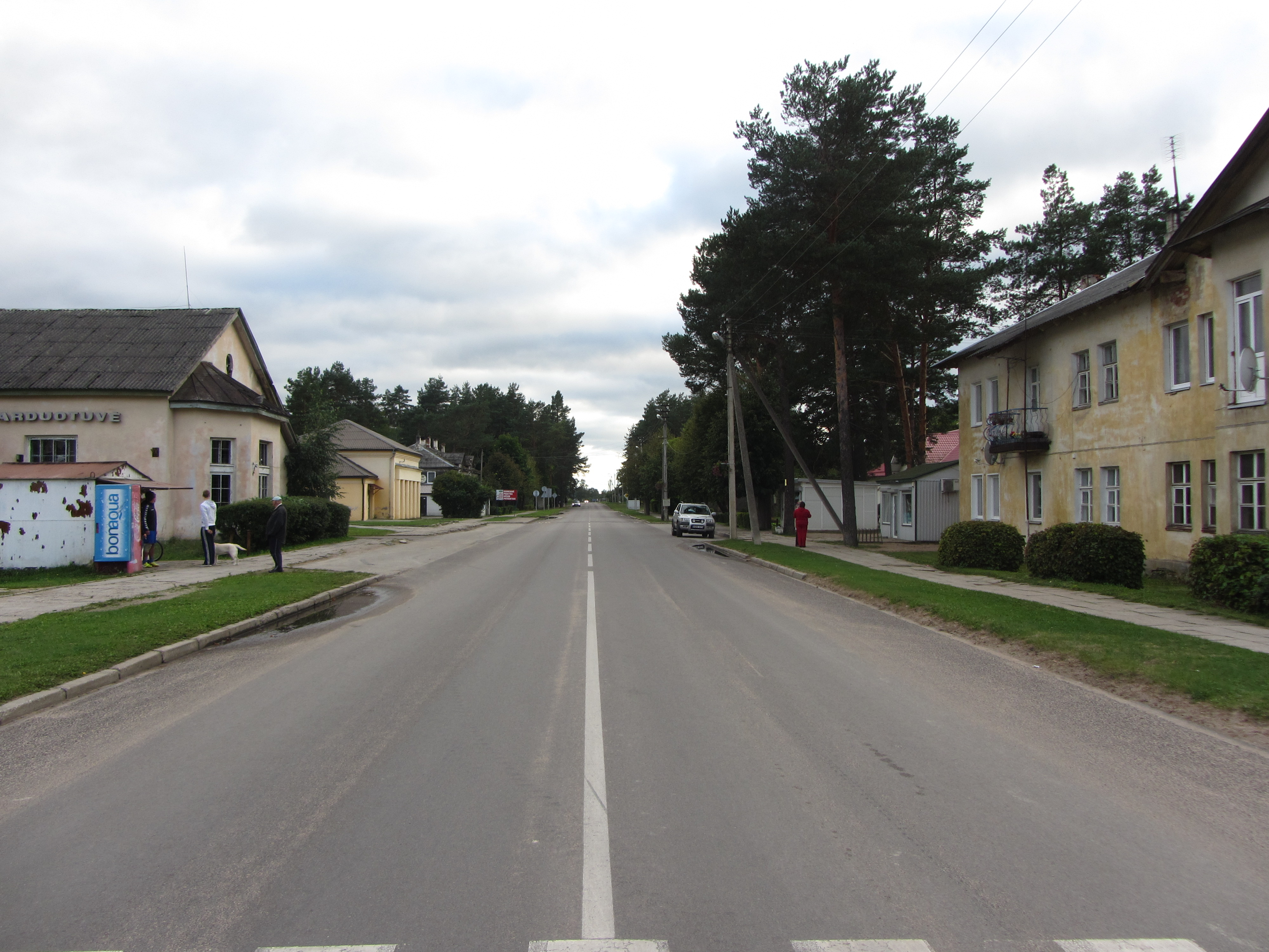 Baltoji Vokė, Lithuania